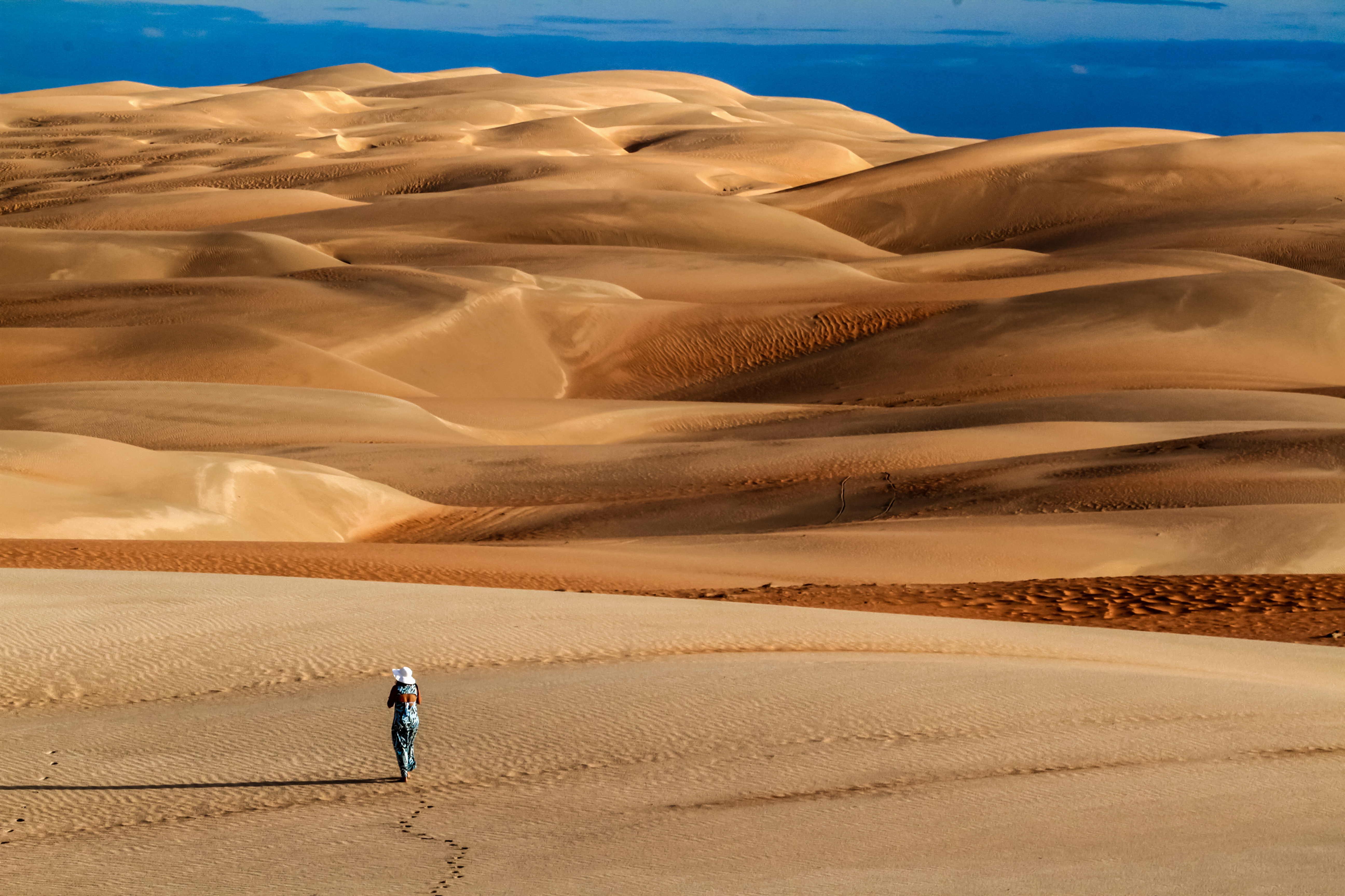 Dunas de Rosado, Porto do Mangue, RN, Brasil